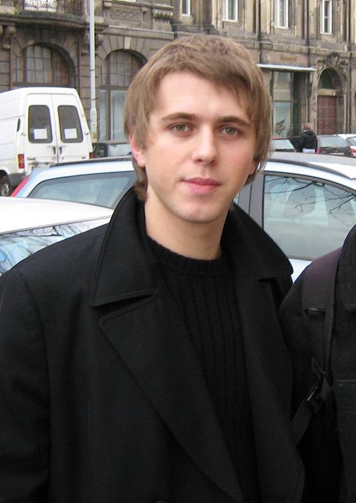 Andrzej Lampert - "Endi" (ur. 2 października 1981 r. w Chorzowie) - polski wokalista.